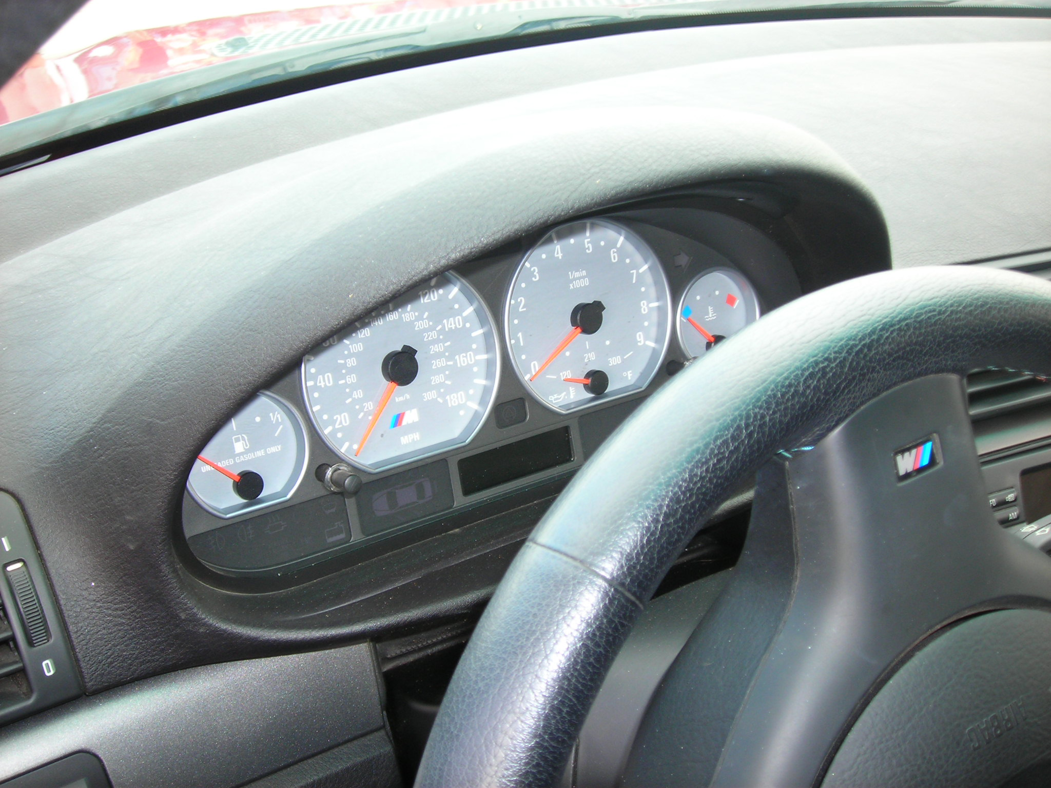 BMW M3 e46 coupe